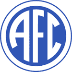 Logo: Abaeté Futebol Clube, Abaetetuba (Pará), Brazil.